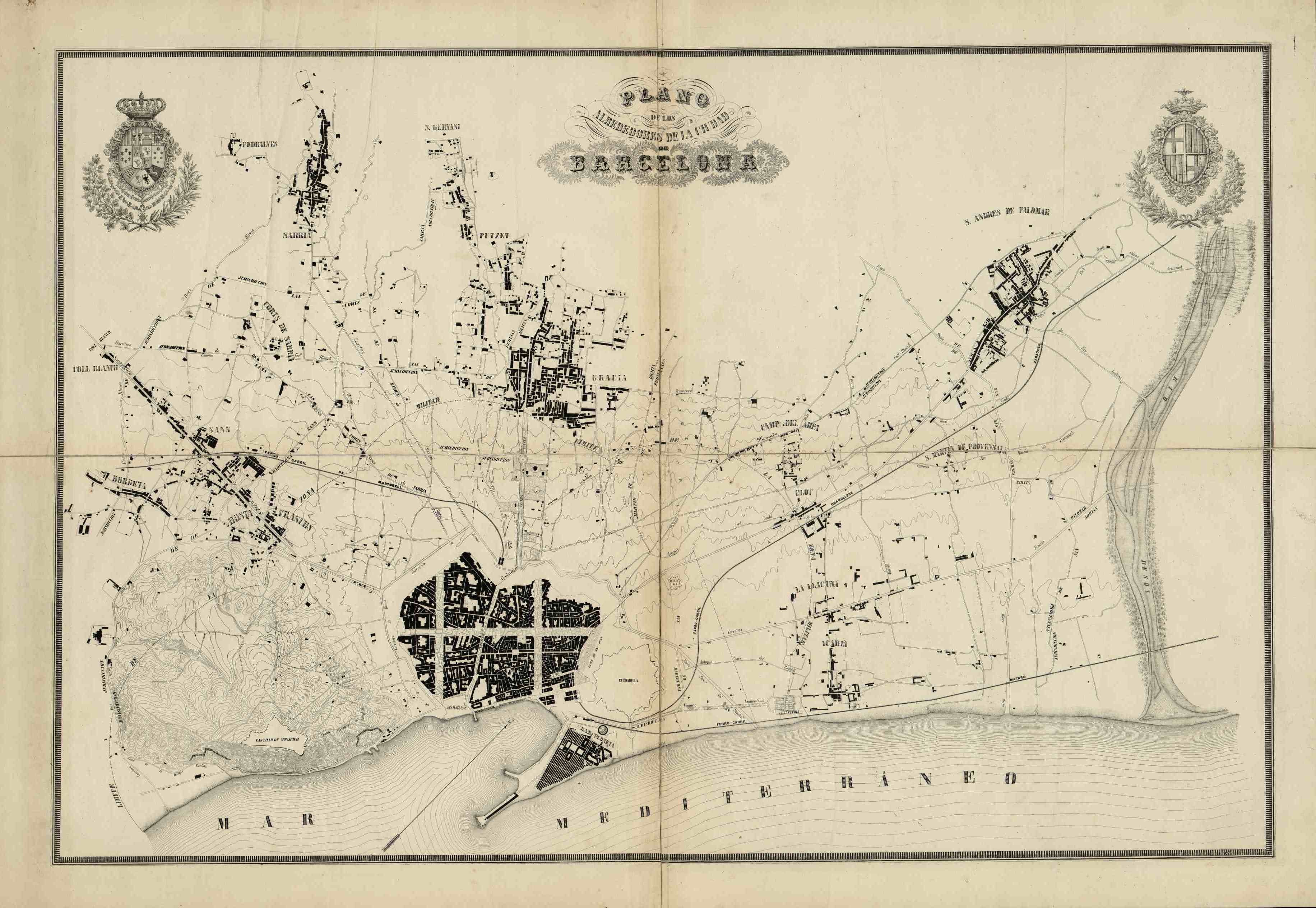 Plano de Barcelona y sus alrededores (1855), de Ildefons Cerdà.